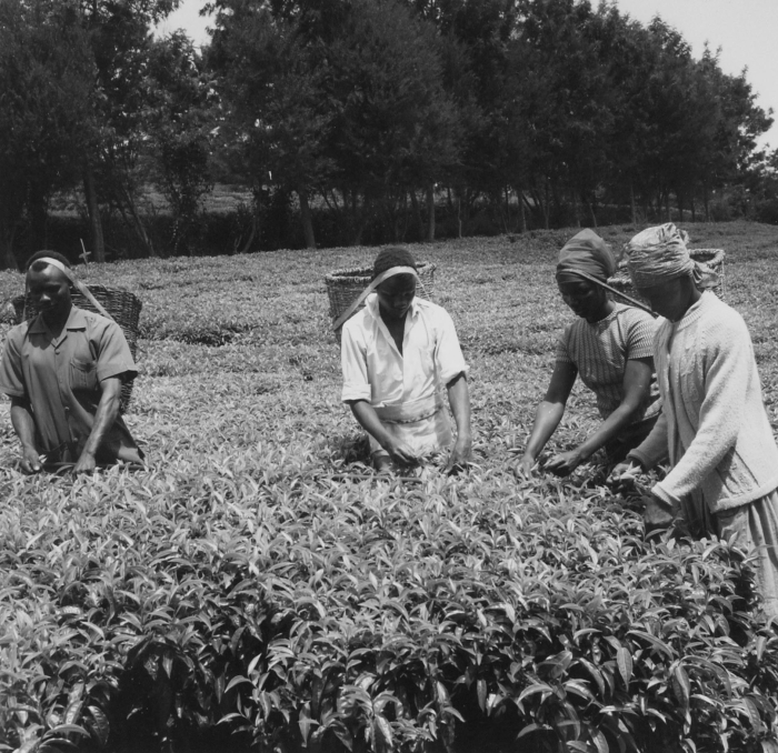 Een bamboestok ligt op de theeplanten en wordt telkens meegeschoven wanneer de pluk vordert. De stok geeft zo aan waar men gebleven is. De foto is genomen op het boerenbedrijf van een zogenaamde 'small holder', een kleine boer (SW, 2009).